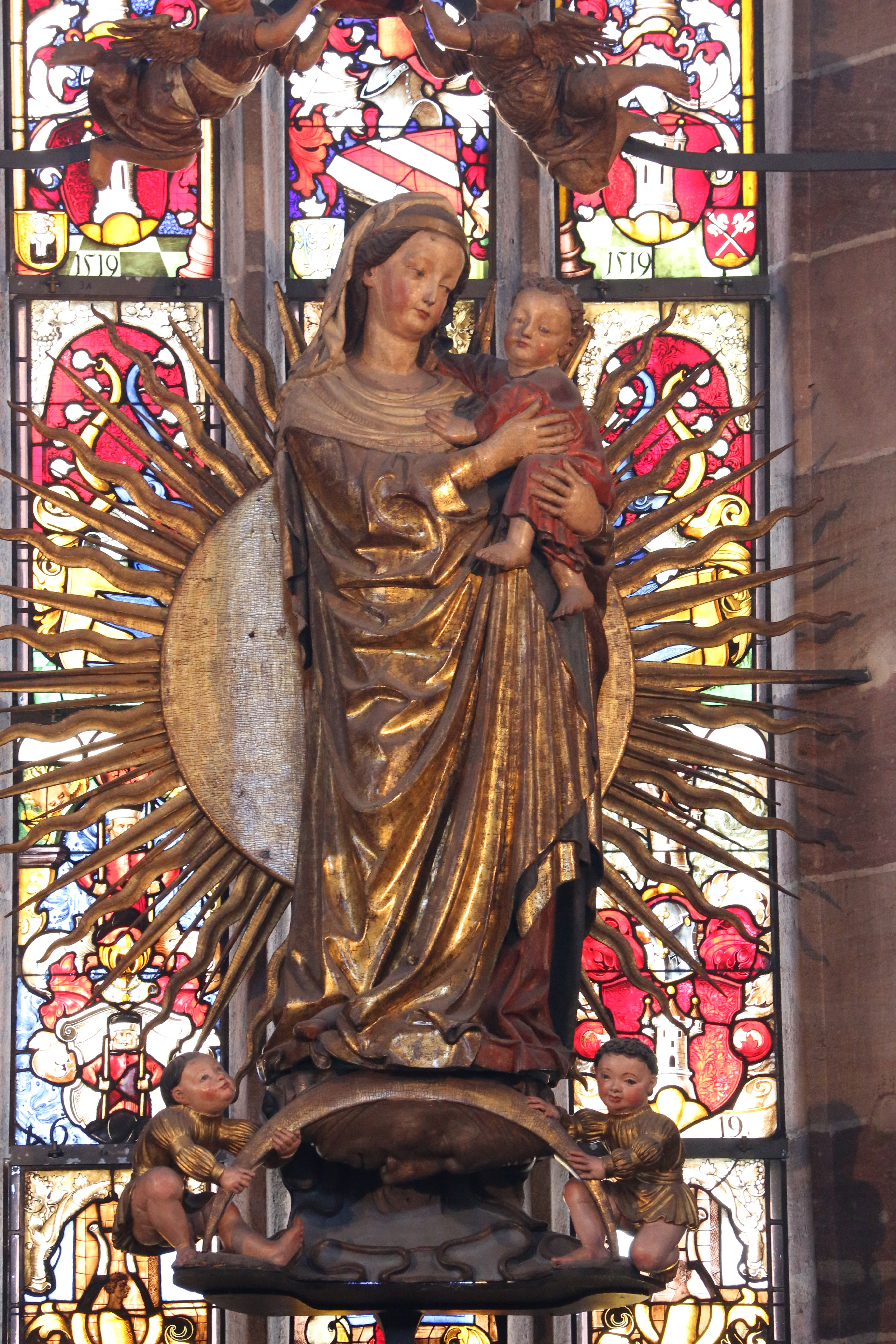 Frauenkirche, Nürnberg